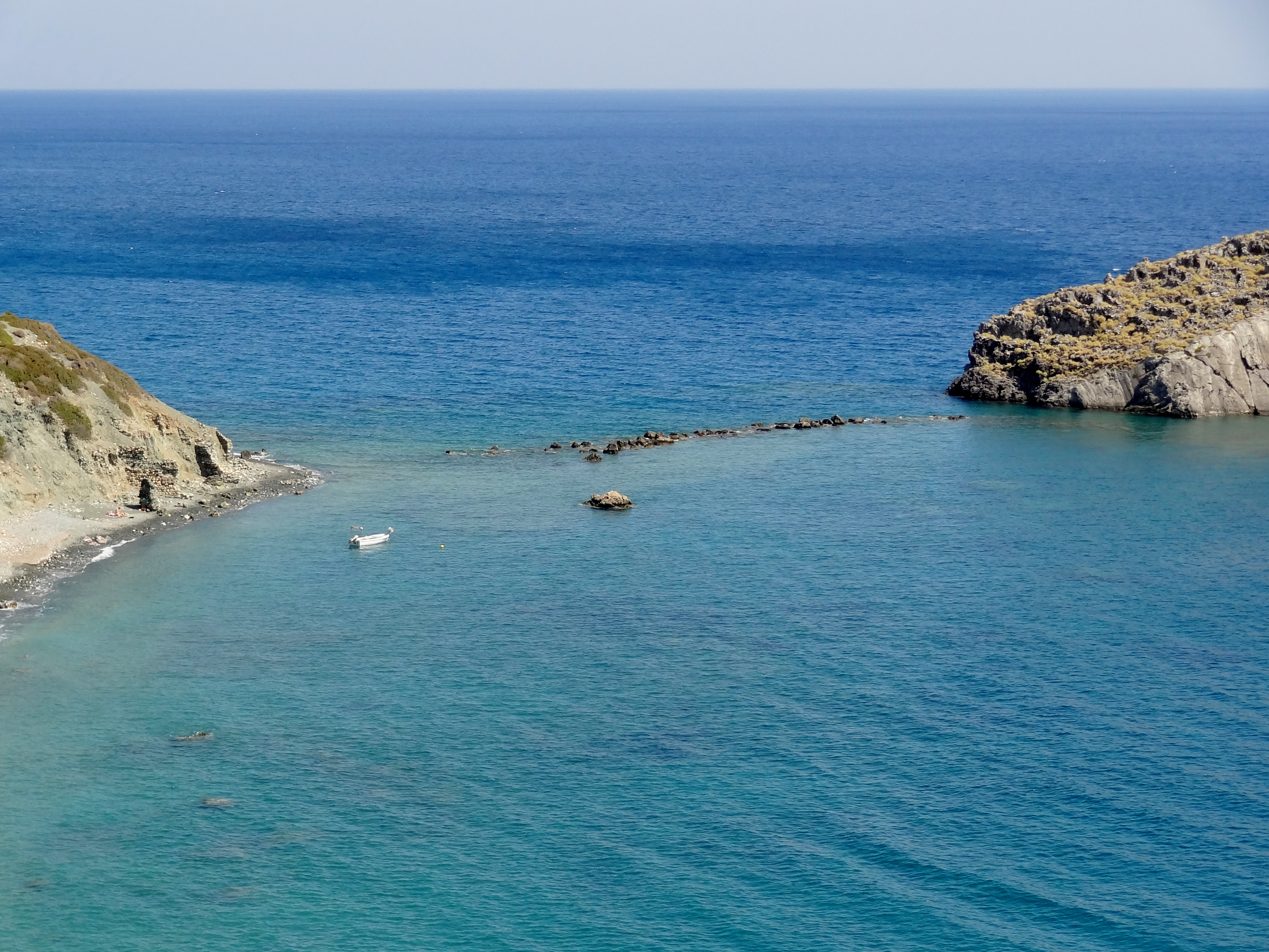 Blick auf die ehemalige Hafenmole von Lasaia (Λασαία) zur Insel Trafos (Τράφος), Gemeinde Festos, Regionalbezirk Iraklio, Kreta, Griechenland